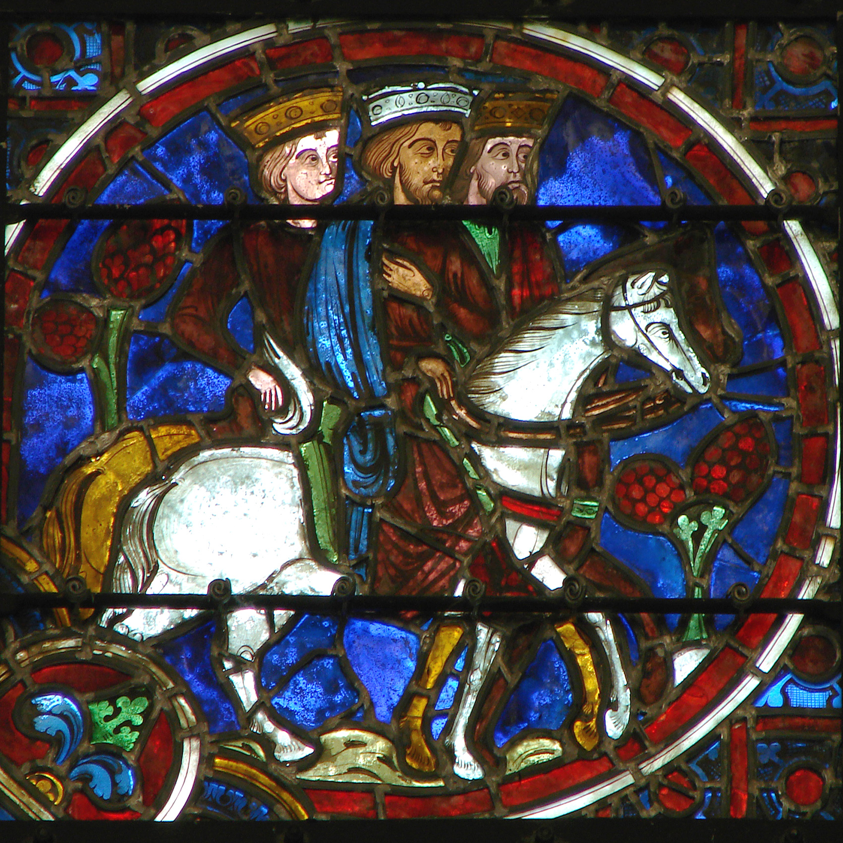 Fenster in der Kathedrale Notre-Dame de Laon. Ursprünglich erstes Viertel des 13. Jahrhunderts, nach der Explosion von 1870 restauriert. Die Reise der Heiligen Drei Könige.